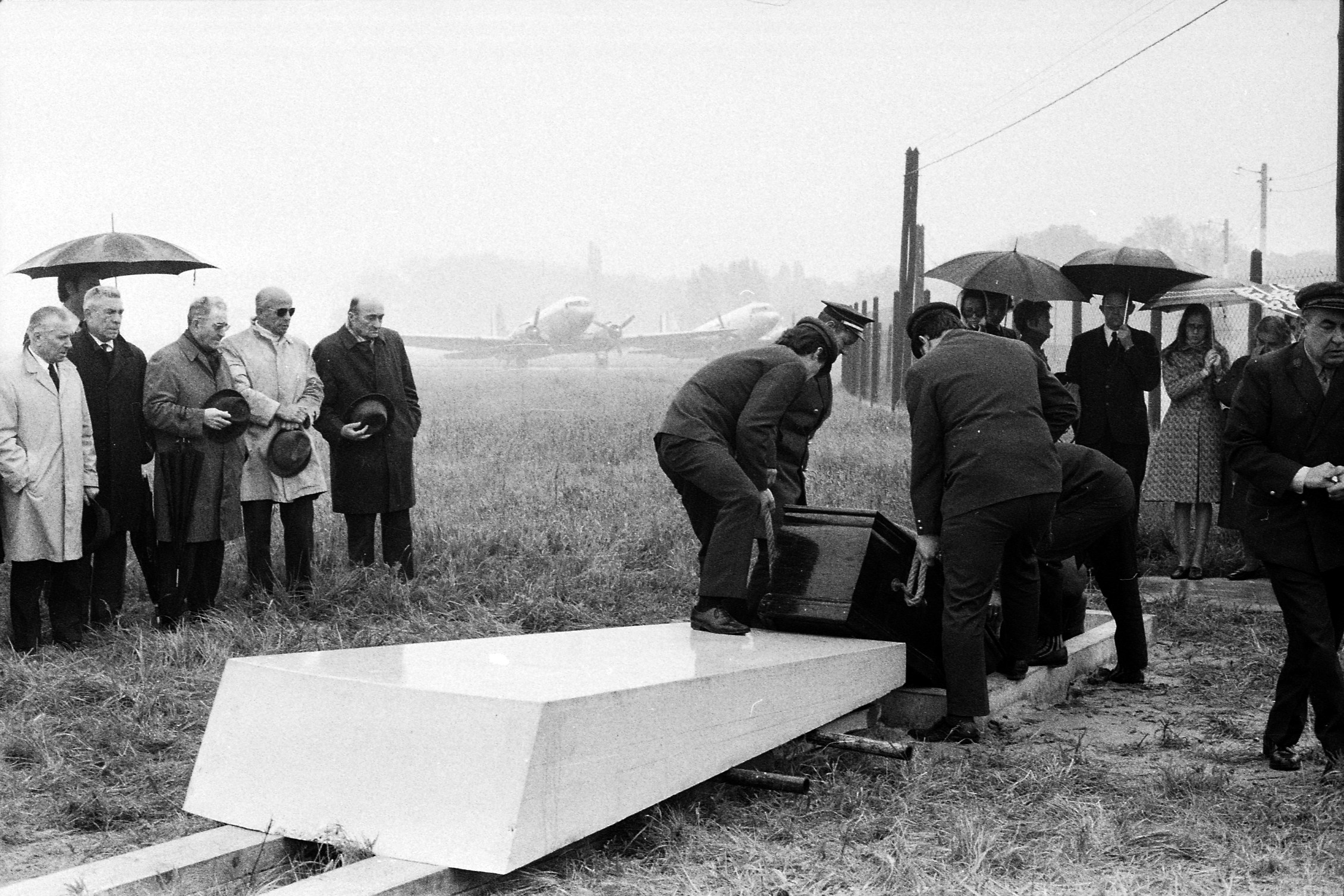 Aérodrome de Montaudran. 21 avril 1972. Au 1er plan des hommes sont en train de mettre le cercueil de Didier Daurat dans la caveau ; au 2nd plan vue de face de la famille et des amis autour du caveau, parapluies ; en arrière-plan avions sur la piste de Montaudran, brouillard, pluie. Cliché pris lors de la cérémonie organisée dans le cadre du transfert du corps de Didier Daurat dans un caveau en bordure de la piste de Montaudran.